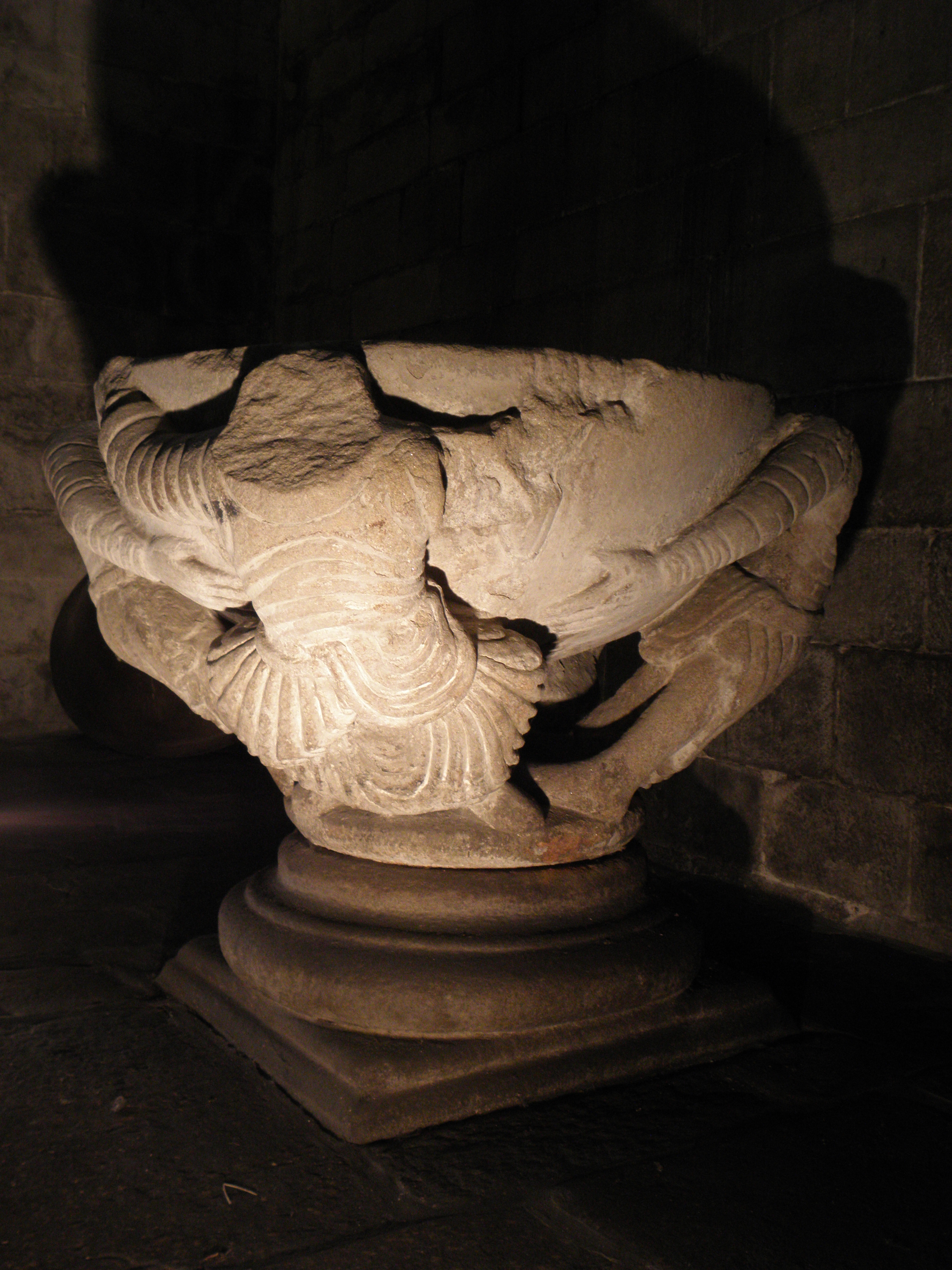 Bénitier roman classé de la basilique Saint-Sauveur de Dinan (22).